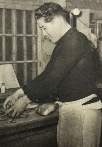 杉山三津男